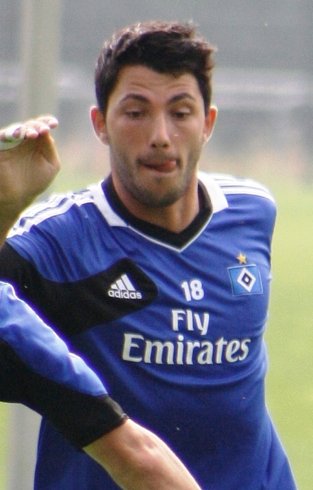 Tolgay Arslan beim HSV-Training am 25. Juli 2013.